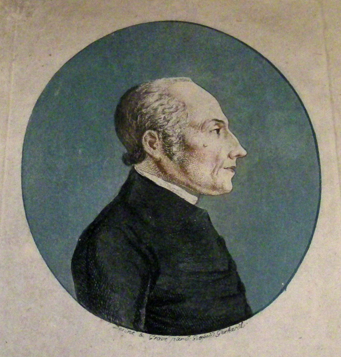 Portrait de Jean-Frédéric Oberlin, ministre de Valdersbach au Ban de la Roche. Dessiné et gravé par J. Gottfried Gerhardt vers 1800 (Musée Jean-Frédéric Oberlin)